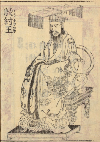 殷紂王、絵本三国妖婦伝より。